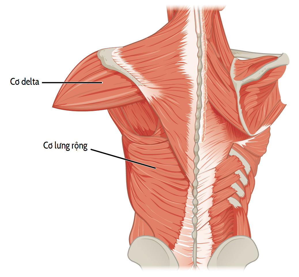 Cơ delta và cơ ngực lớn